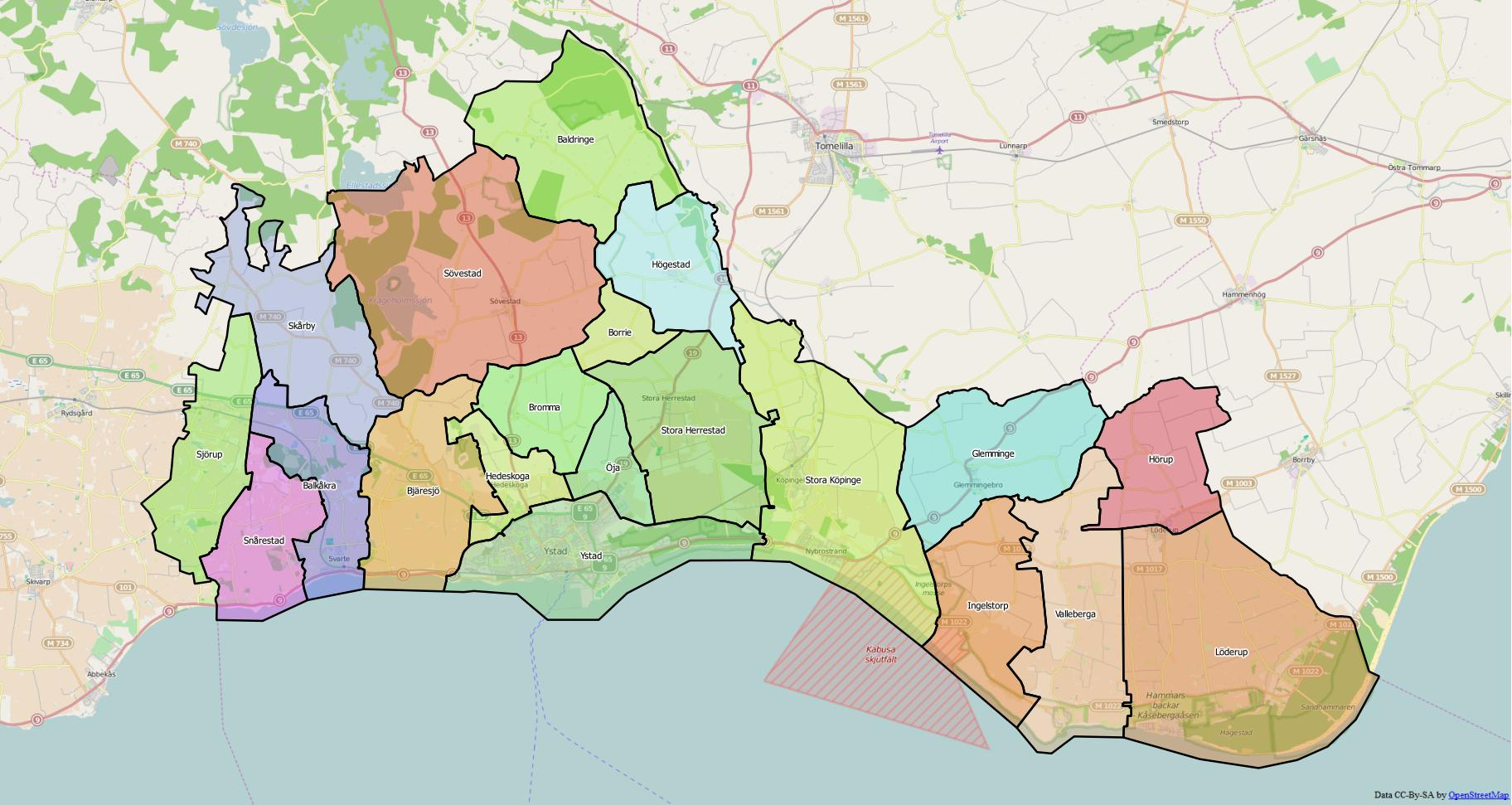 Distriktsindelningen i kommunen.